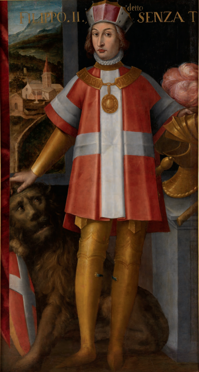 Ritratto del Duca Filippo II il Senza Terra